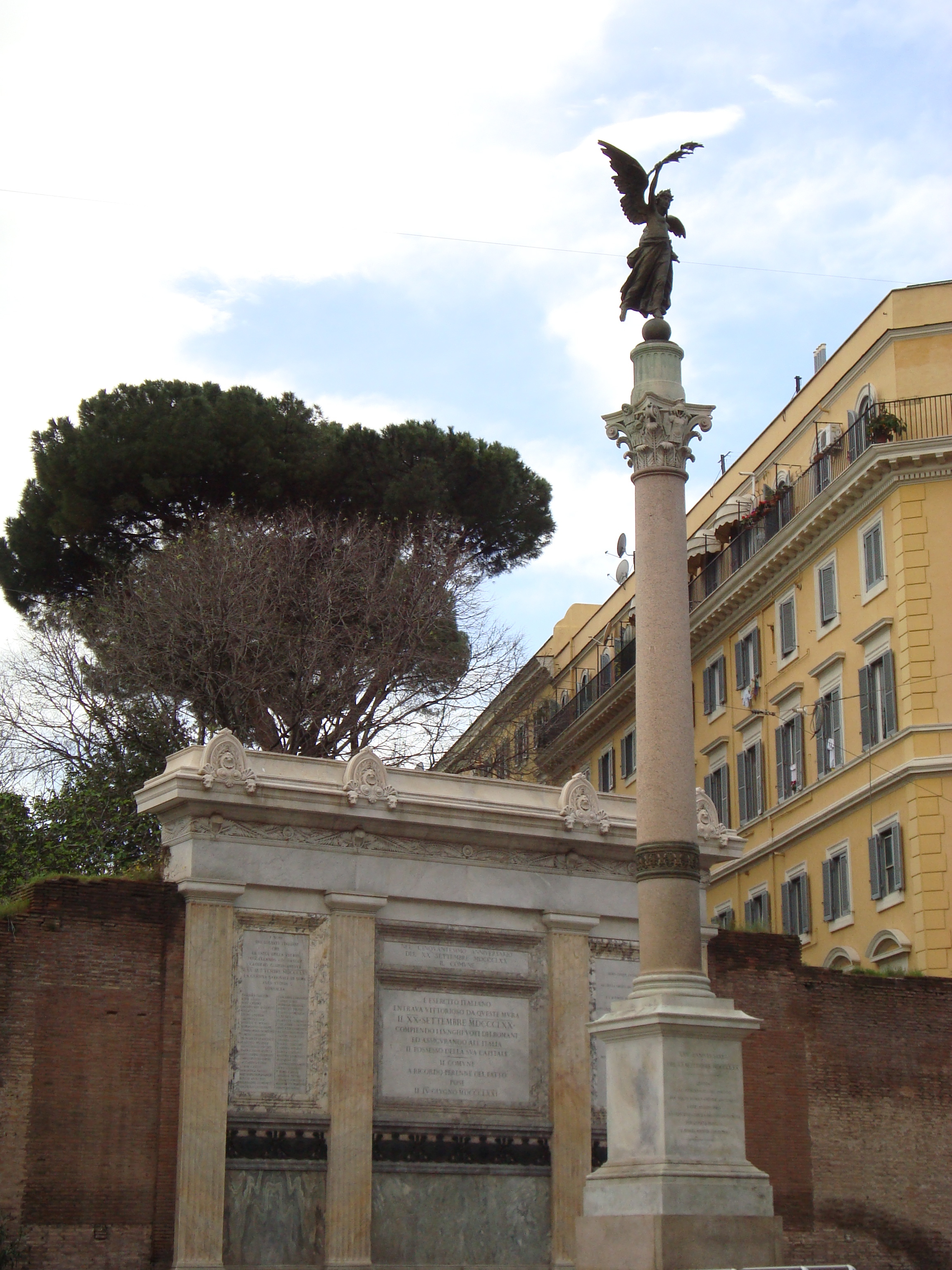 Momument commémoratif et plaque érigés à brèche de la porte Pia pour le cinquantennaire de la célébration du XX septembre 1870 à Rome